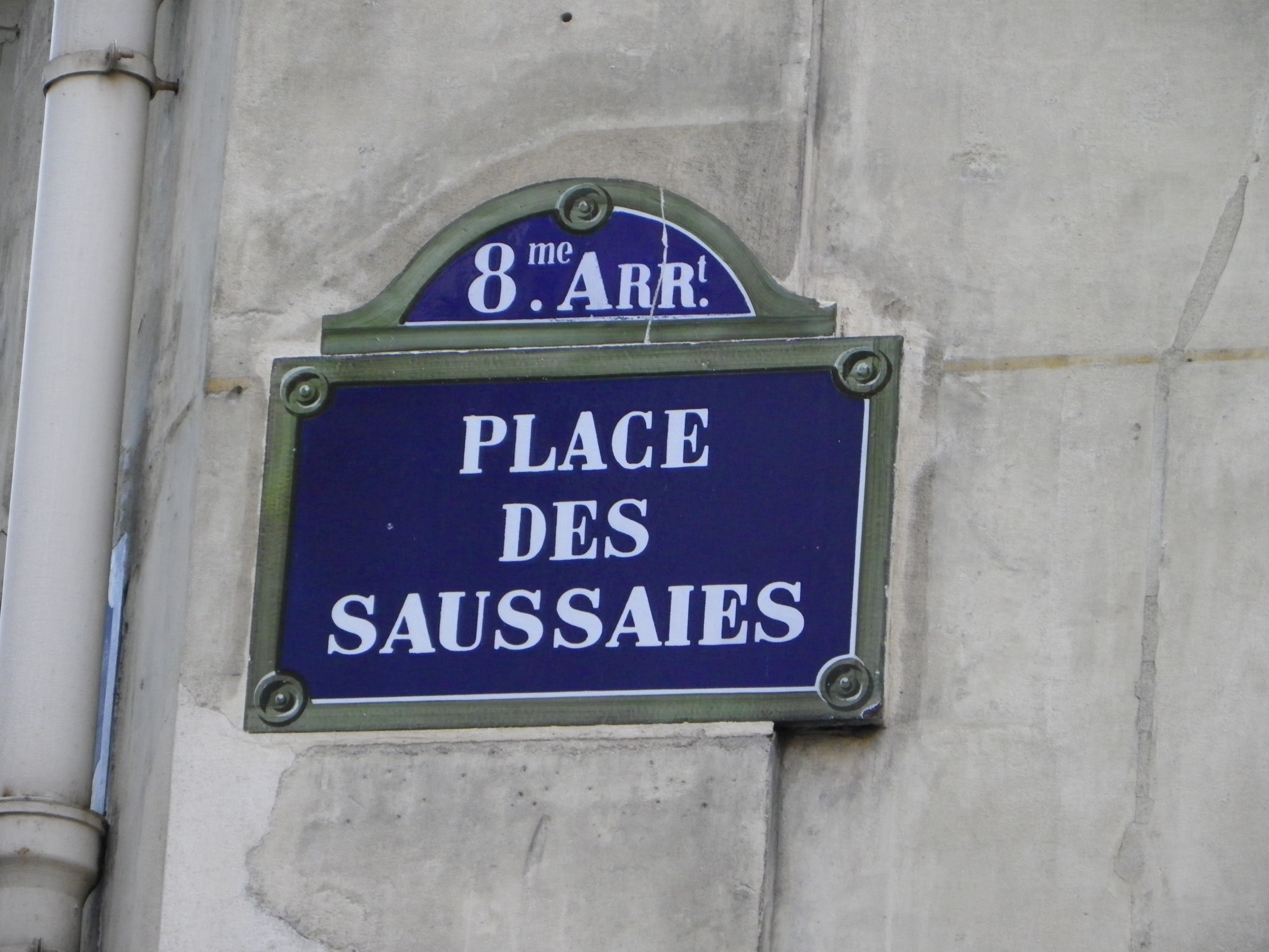 Plaque place des Saussaies à Paris